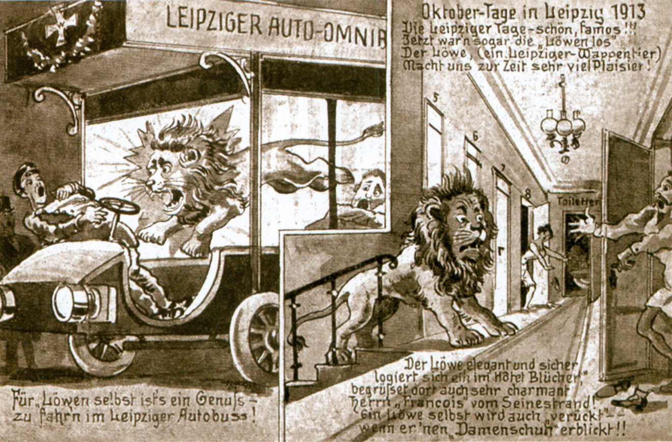 Die Postkartenverlage reagierten als erste mit lustigen Karikaturen auf die Leipziger Löwenjagd am 19. Oktober 1913.